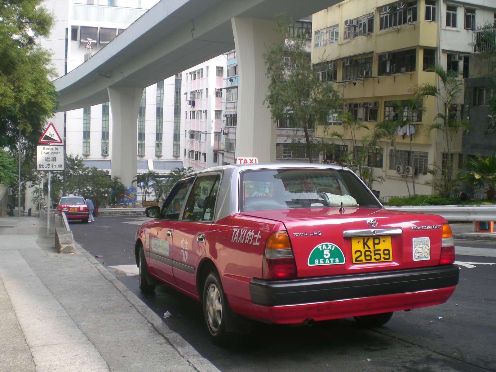 香港山道的士站